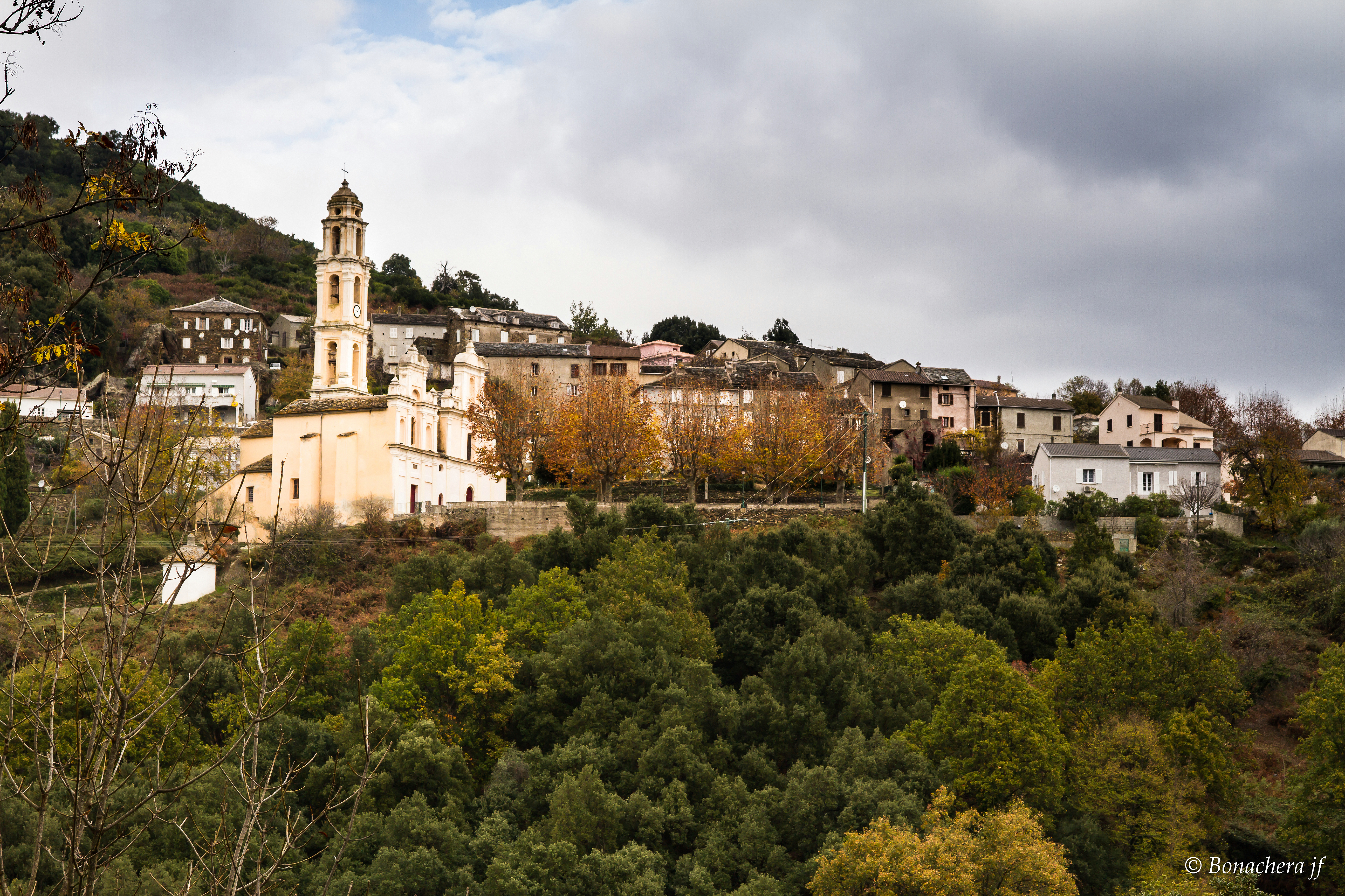 Pietra-di-Verde (Haute-Corse) - A Tozza (hameau du Mucchju)